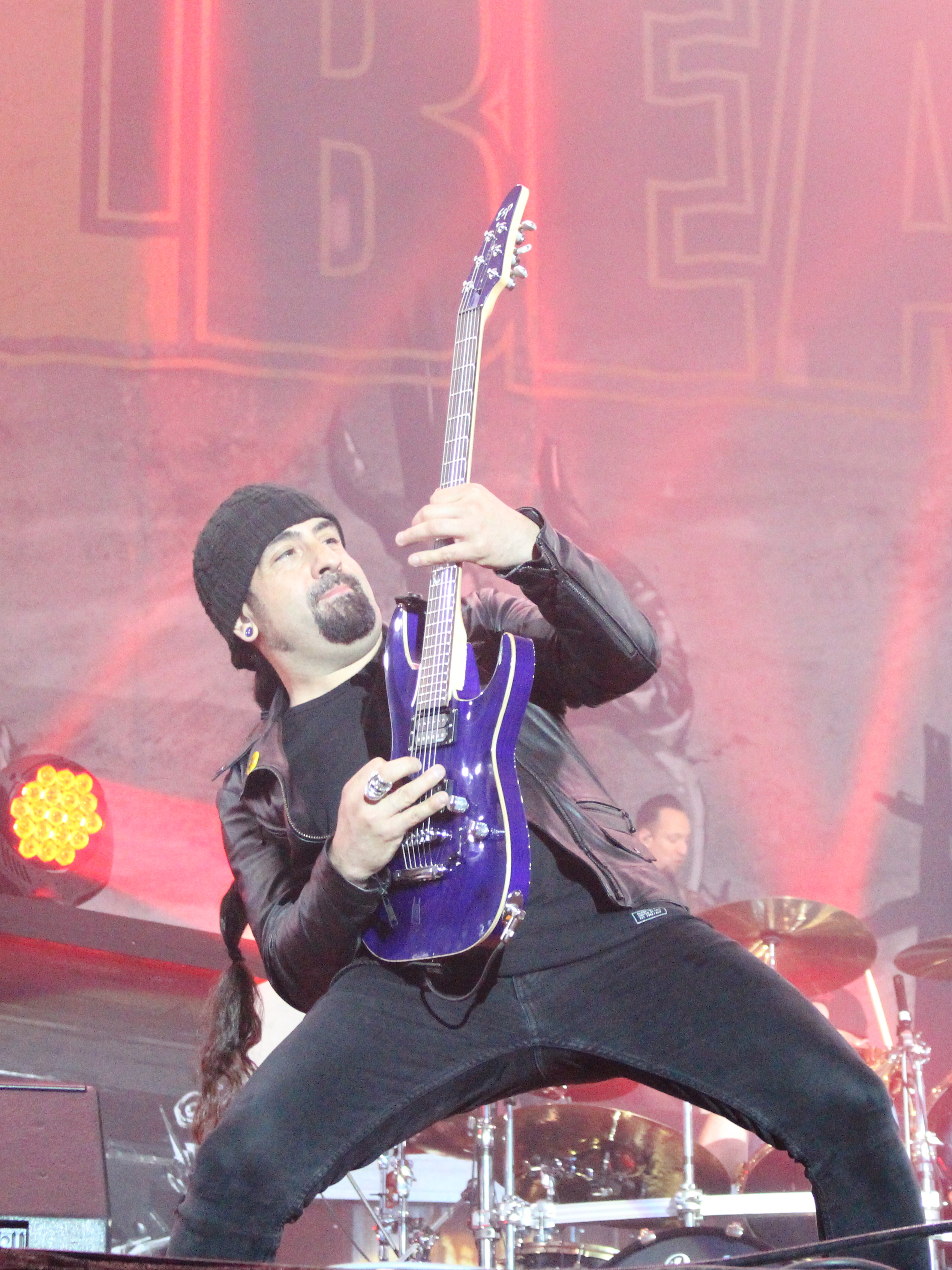 Festivalsommer This photo was created with the support of donations to Wikimedia Deutschland in the context of the CPB project "Festival Summer".